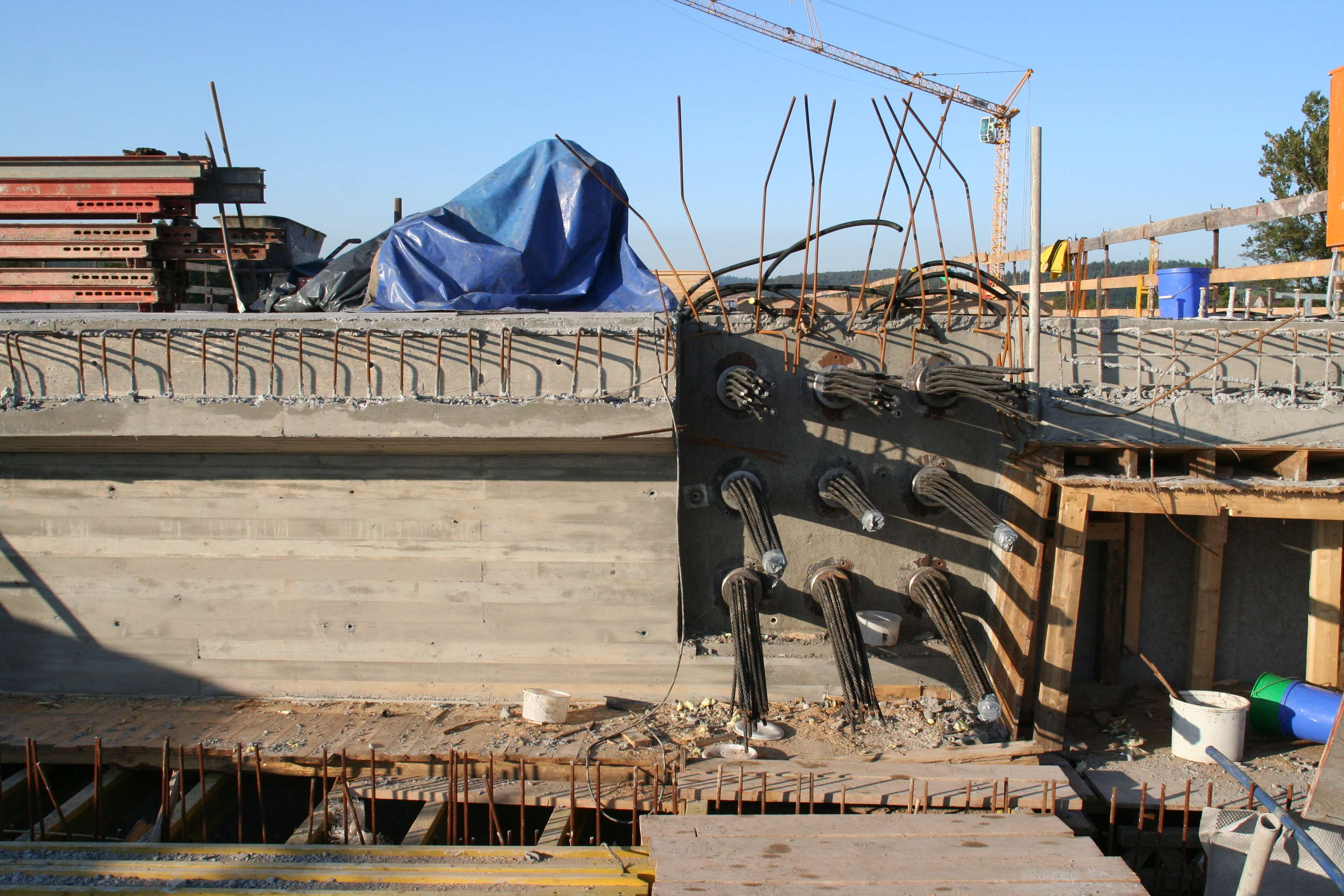 Füllbachtalbrücke, bei Zeickhorn (Grub am Forst) in Oberfranken Spannglieder nach dem Vorspannen